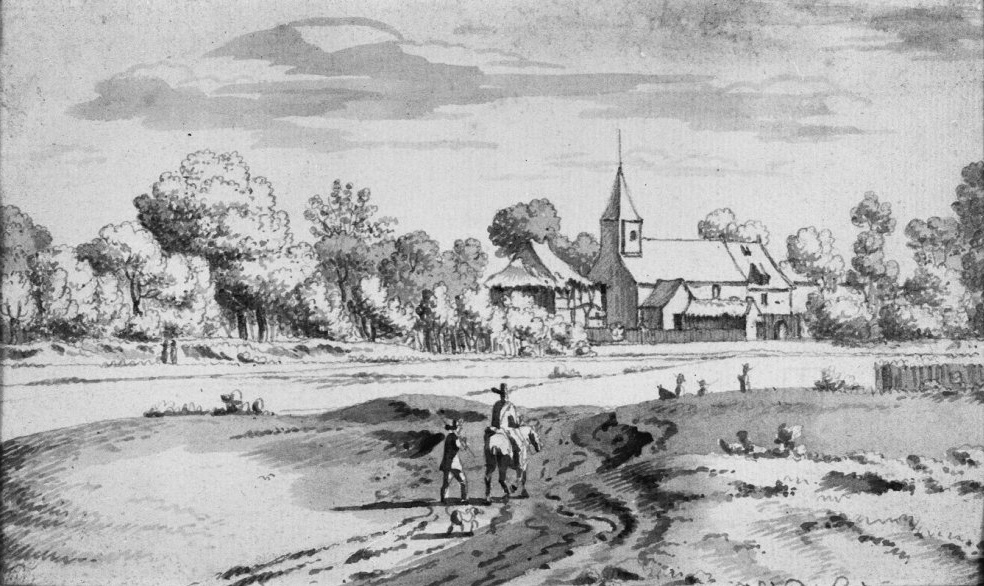 Rooms-Katholieke Kerk: tekening van J.de Grave, 1676